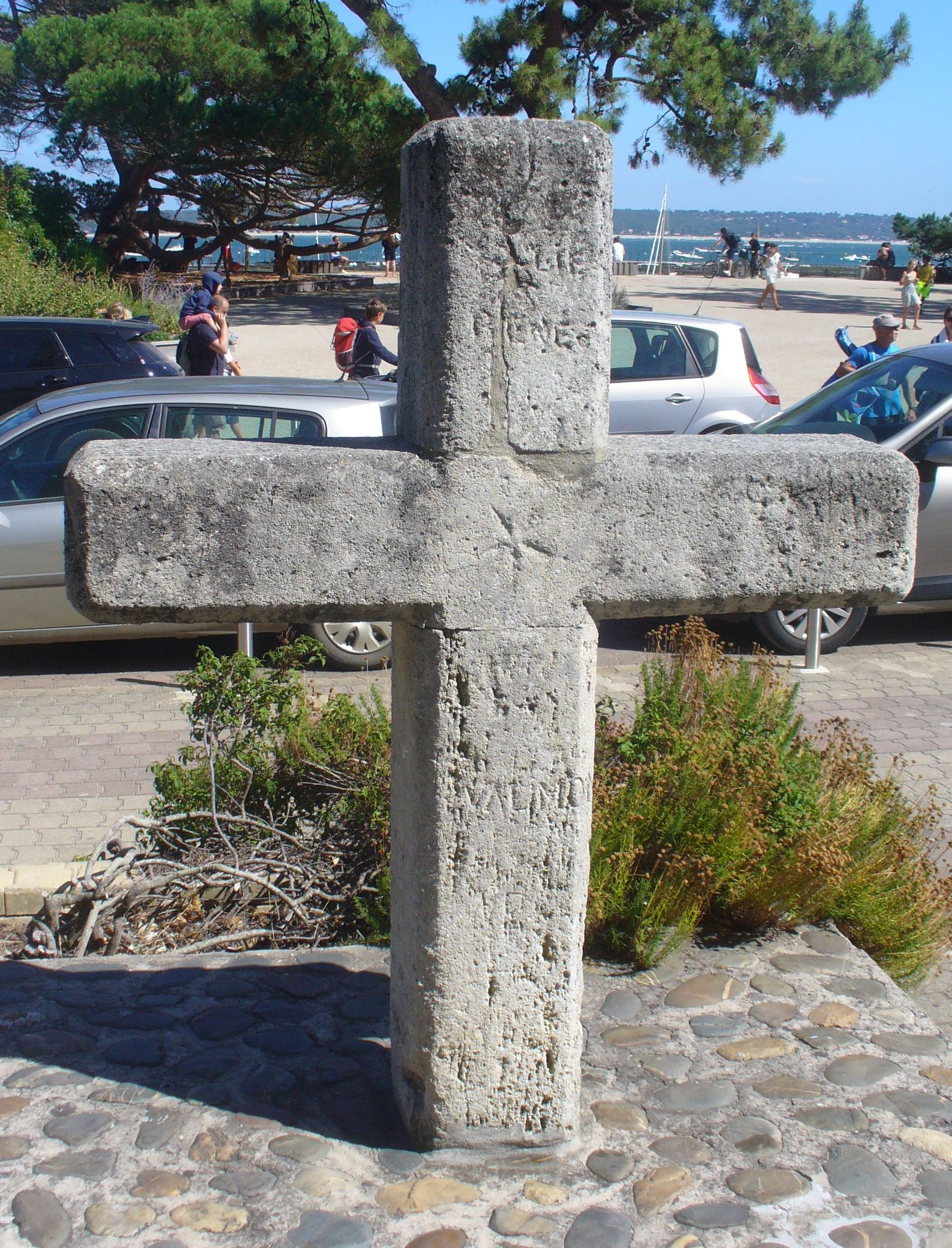 parvis ND des Flots